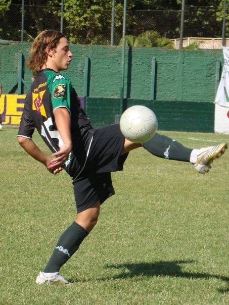 Tomás De Vincenti es un jugador argentino nacido el 9 de Febrero del 1989, que se desempeña como centrocampista y que actualmente se encuentra jugando en la Primera División de Grecia del Equipo Pas Giannina.